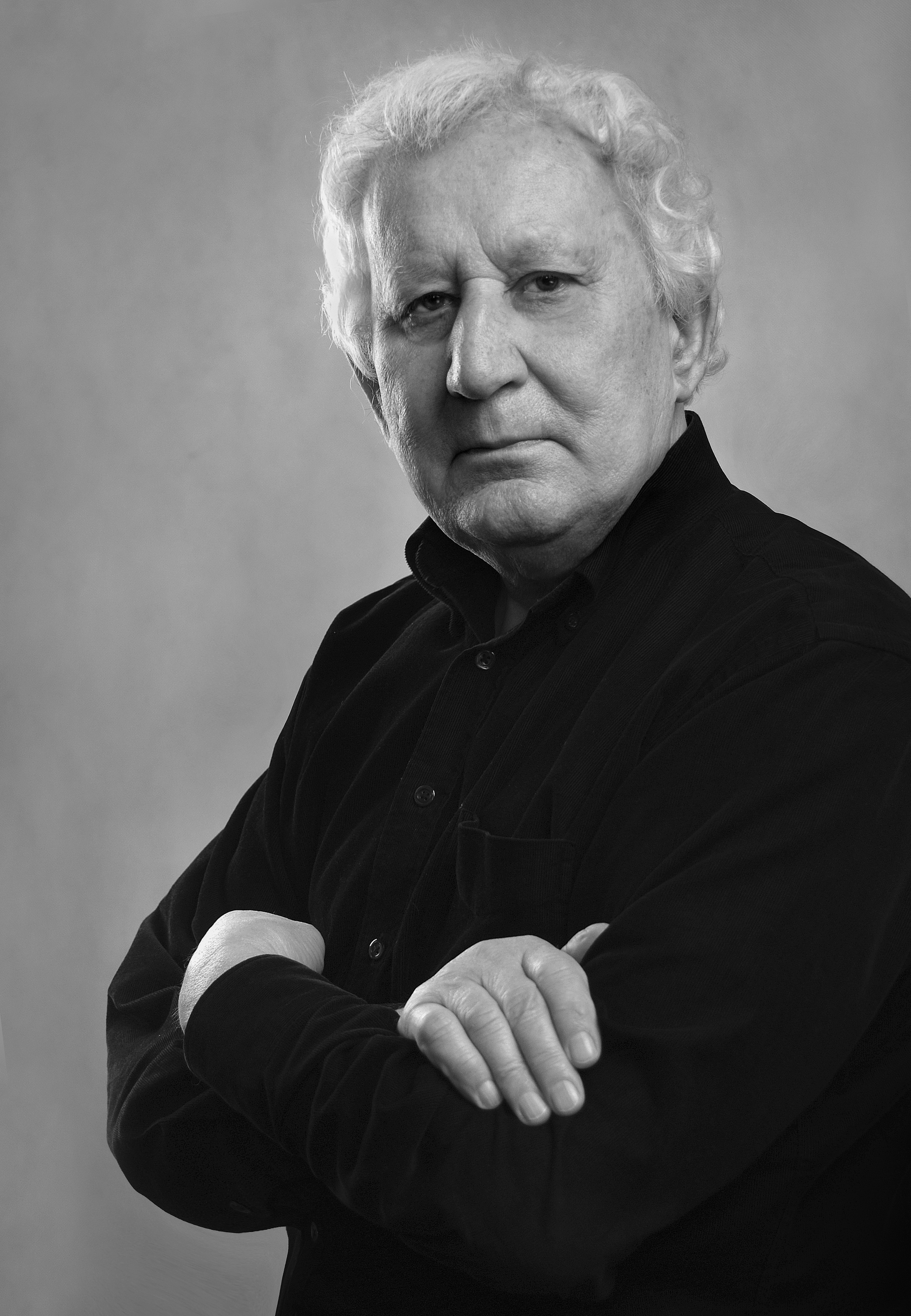 Adam Wodnicki, 2011 r.